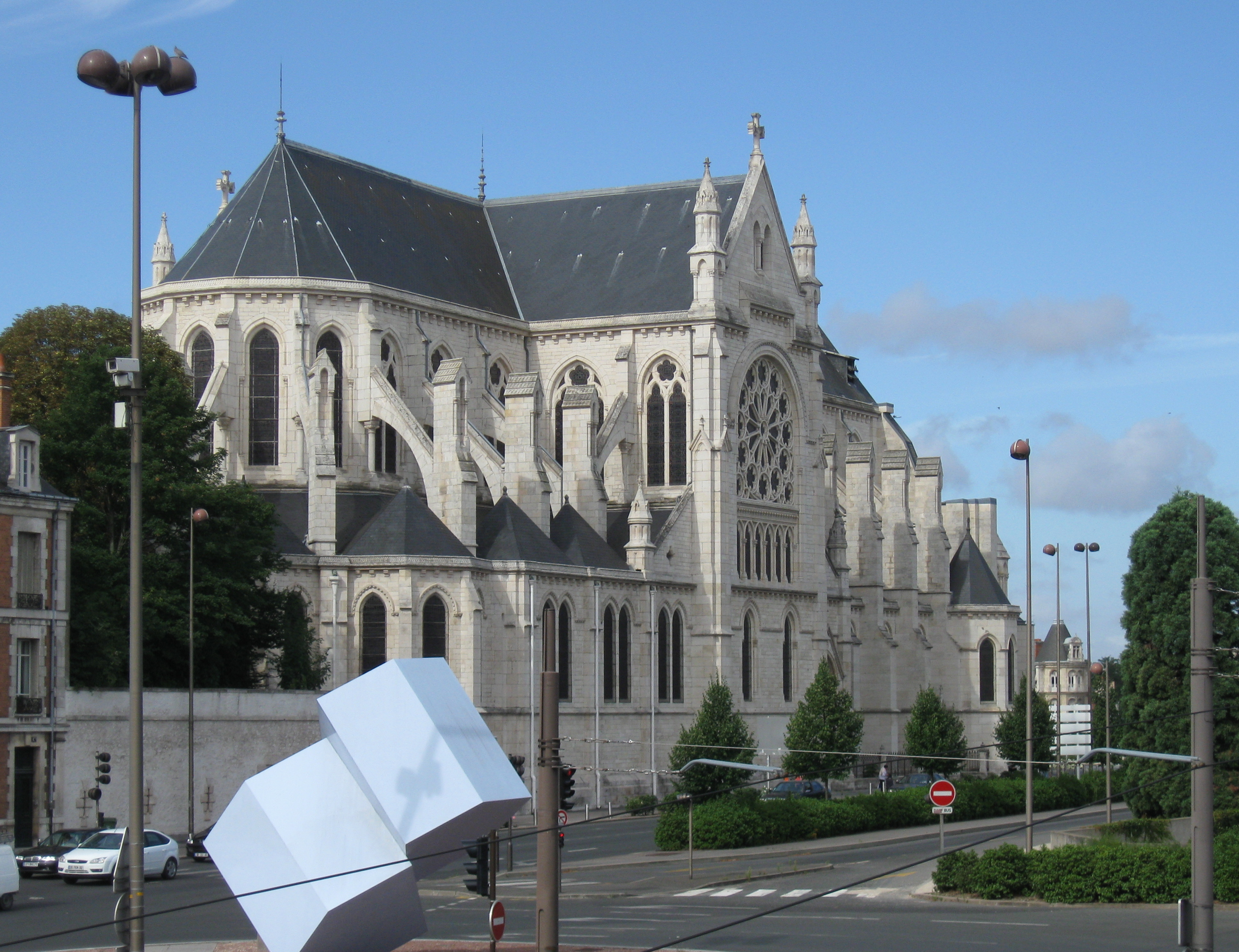 Église Saint-Paterne, Orléans, Loiret, France